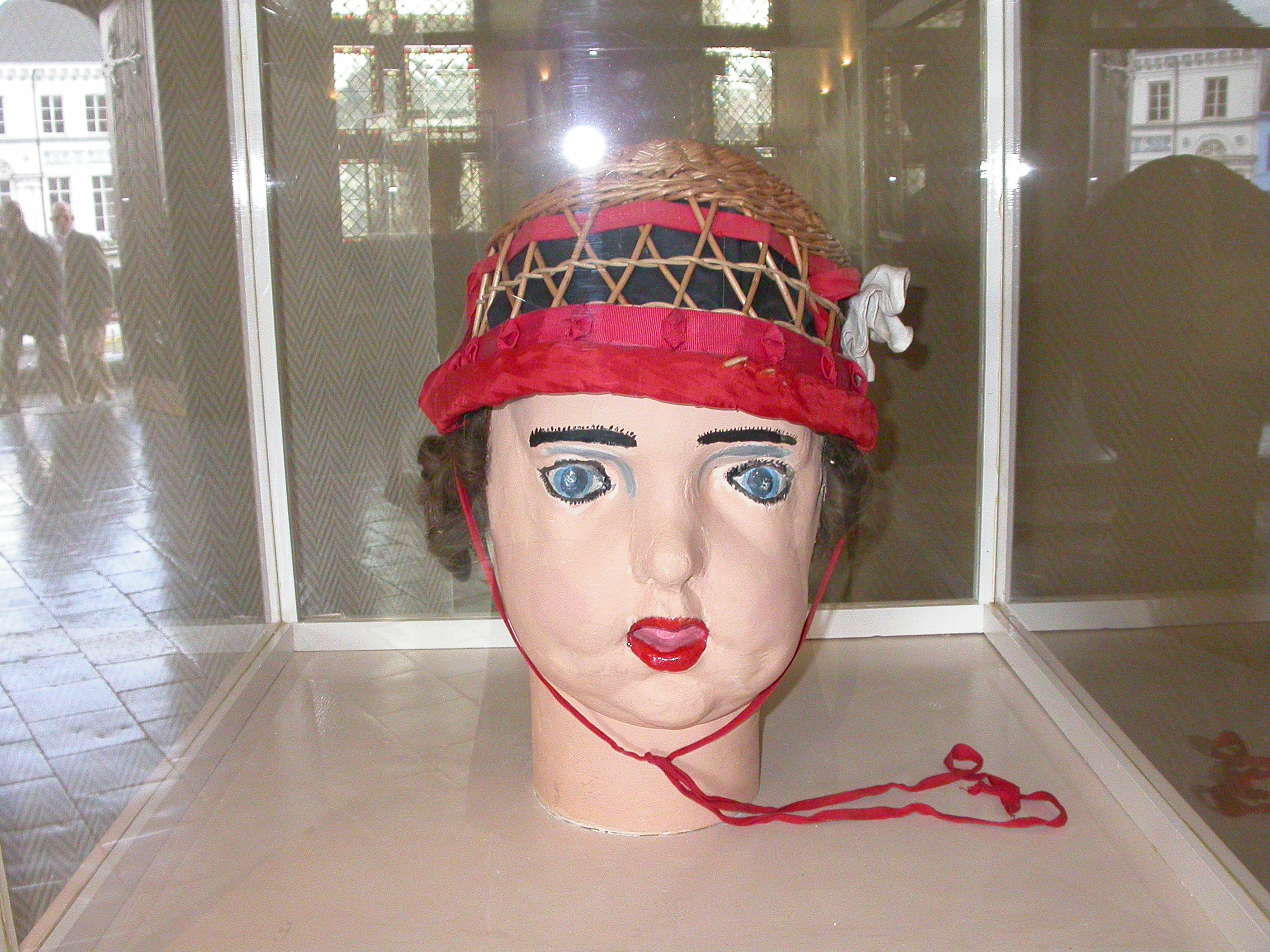 Hoofd Geraardsbergs Reuzenkindje Kinneke Baba